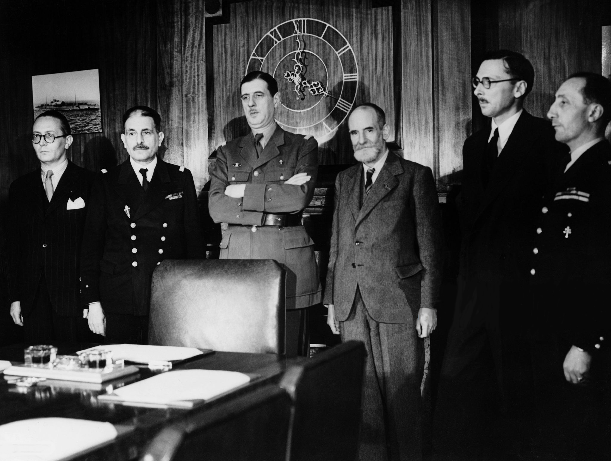 Le Comité national français, à Londres. De gauche à droite : André Diethelm, Émile Muselier, Charles de Gaulle, René Cassin, René Pleven et Philippe Auboyneau.